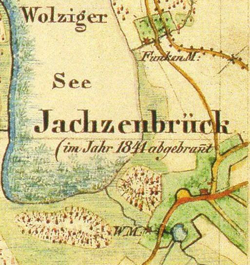 Lindenbrück, früher Jachzenbrück, Ortsteil der Stadt Zossen, Lkr. Teltow-Fläming, Brandenburg, Deutschland, Urmesstischblatt von 1841